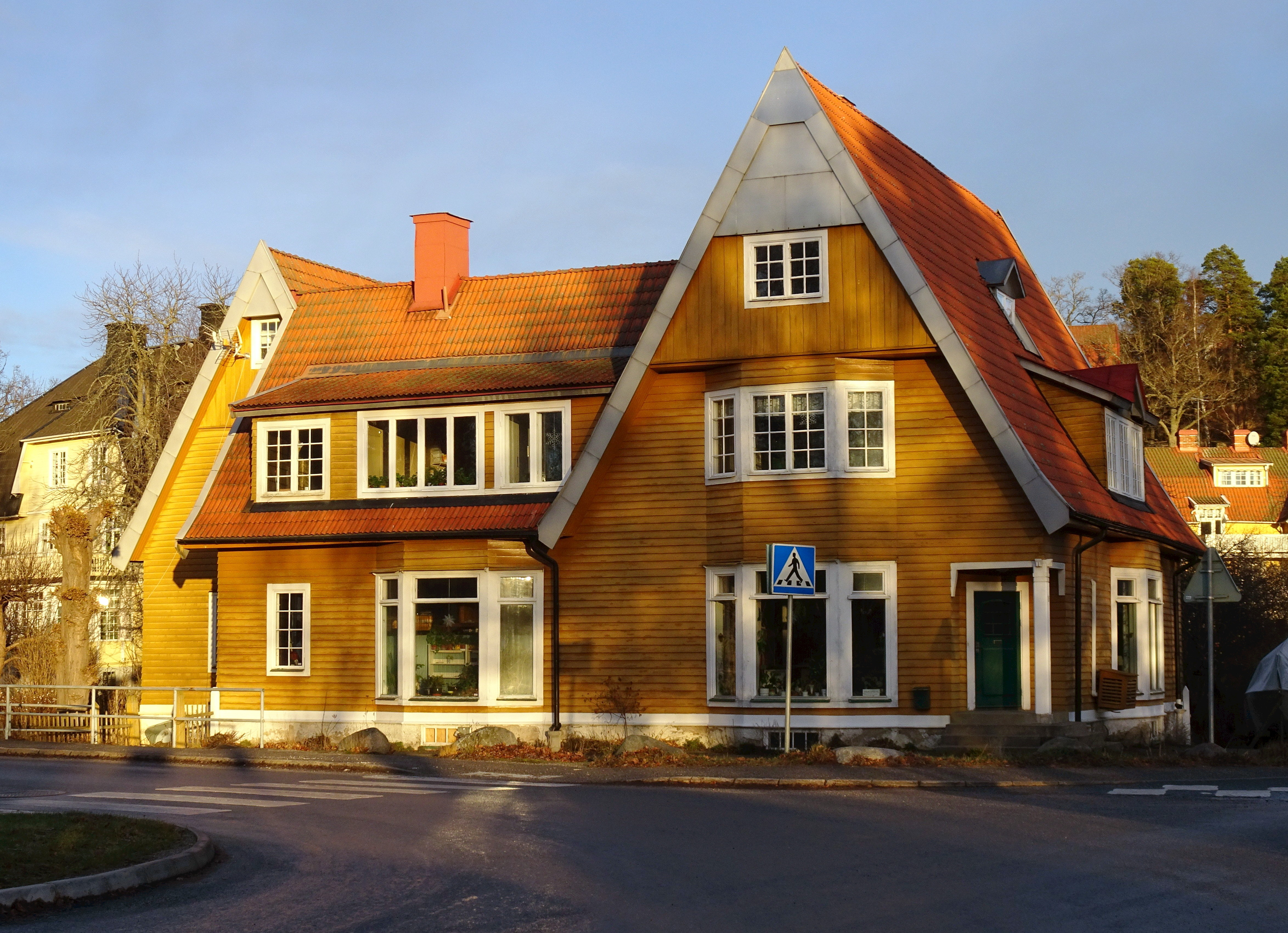 Villa på Pålnäsvägen 1 i området Baggensudden, ritad 1916 av Lars N:son Gramén.